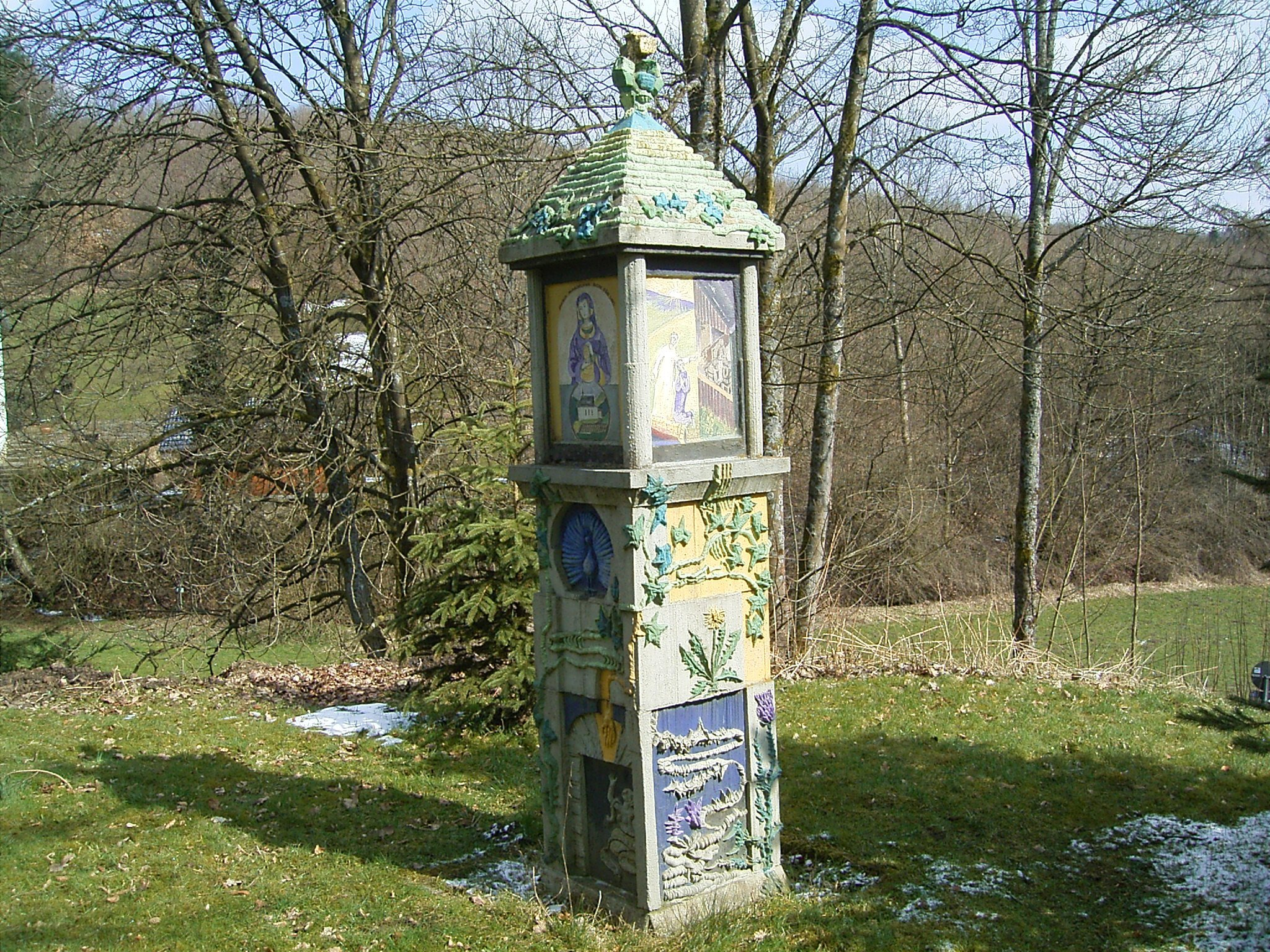 Bildstock an der Kapelle Grotewiese in Meinerzhagen-Valbert.